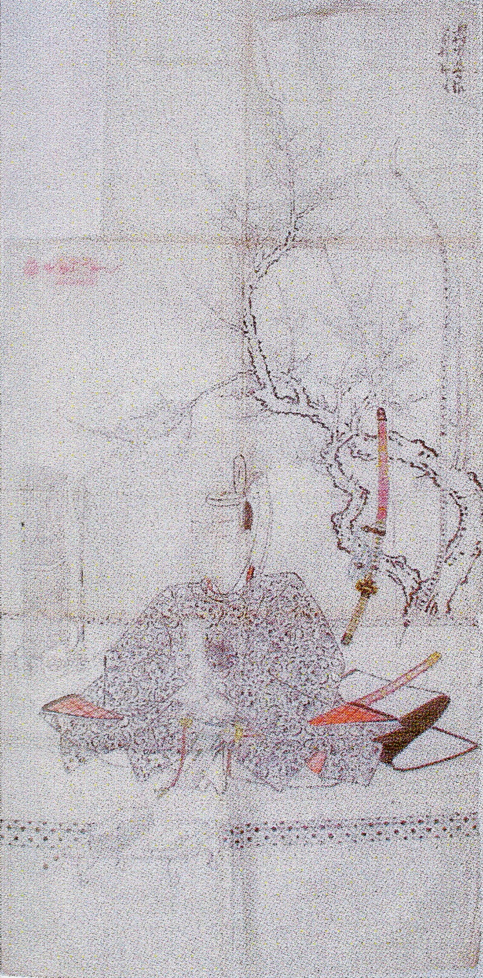 加賀八家奥村分家3代当主・奥村悳輝の肖像画粉本。